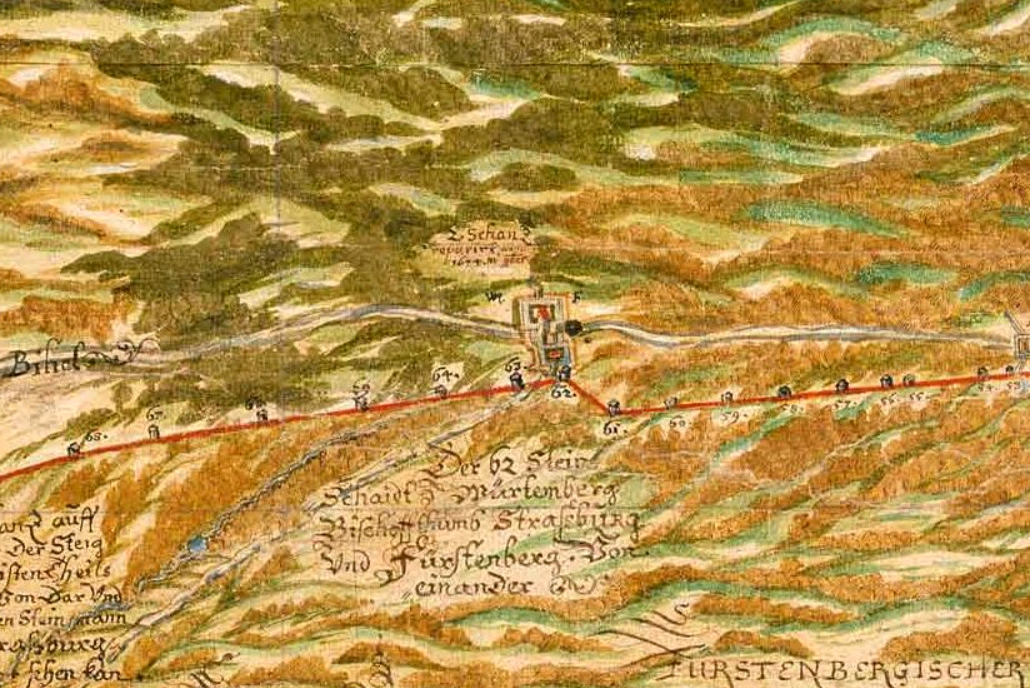 Freudenstädter Forst samt dem Waldgeding alle mit ihren Markungen und angrenzenden Forsten, darin auch die Ämter Freudenstadt und Dornstetten